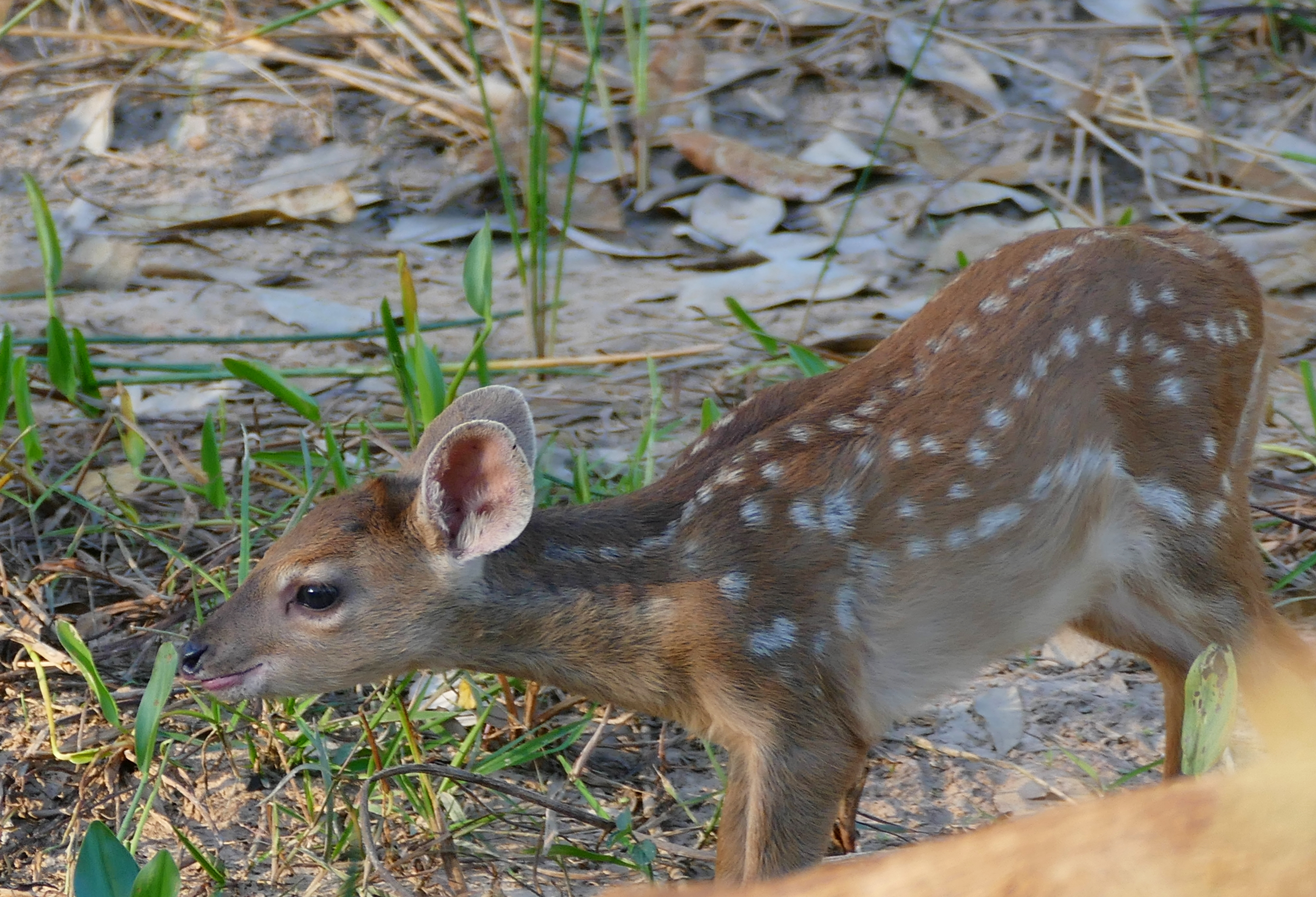 Pouso Alegre, Transpantaneira, Poconé, Mato Grosso, BRAZIL